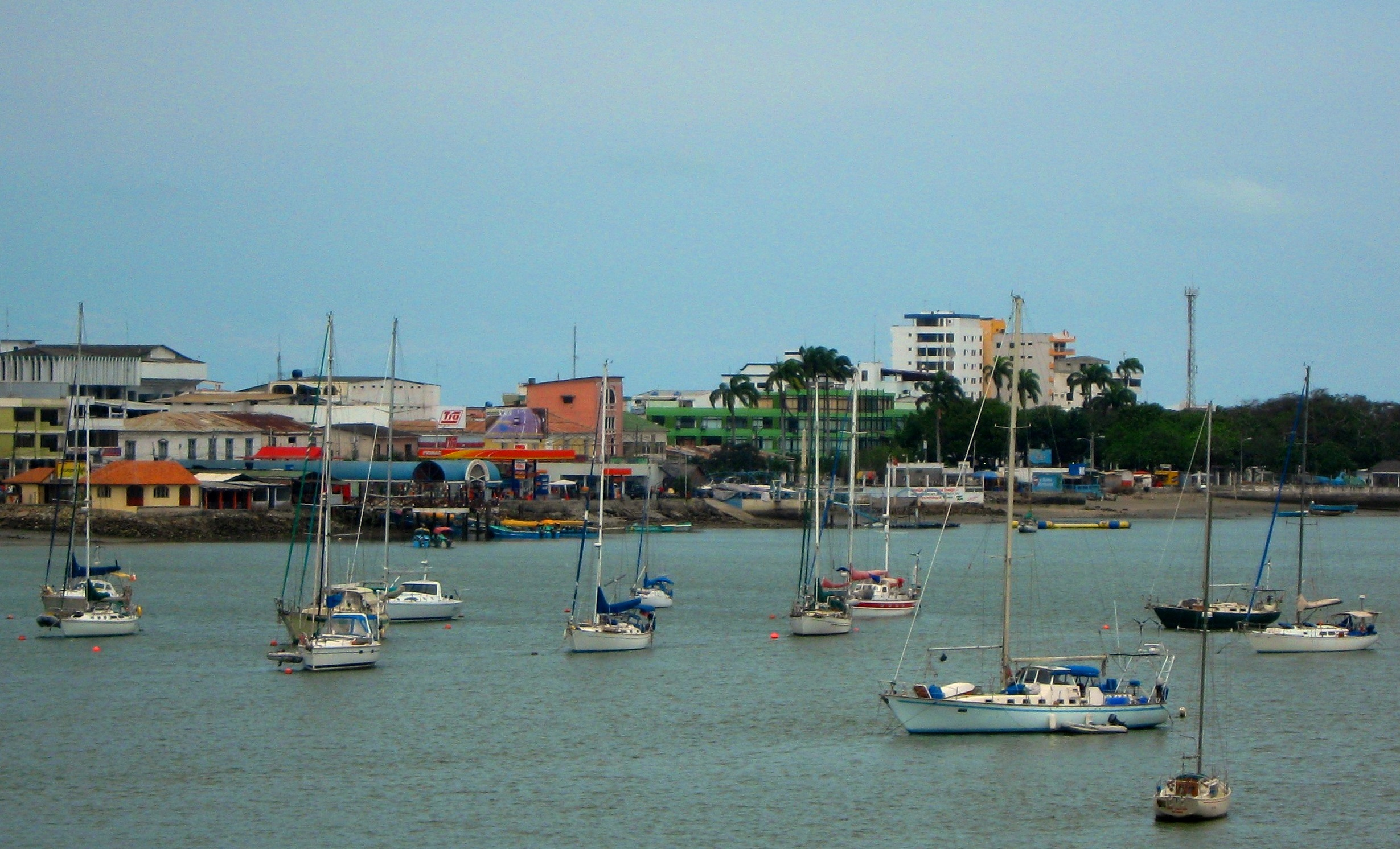 Fotografía de la ciudad de Bahía de Caráquez, Ecuador. Tomada desde el puente "LOS CARAS"